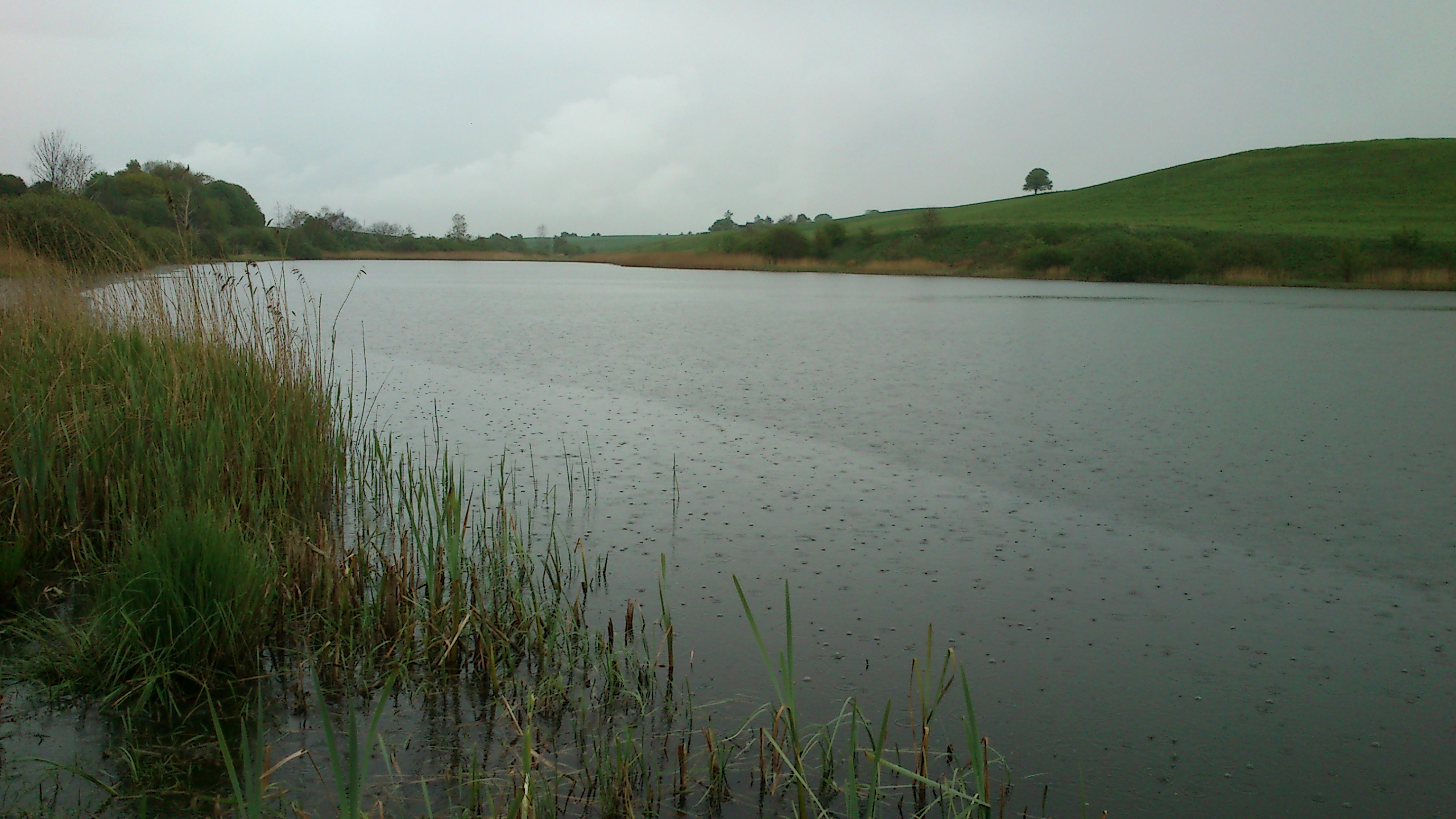 Geding Sø i regnvejr. Den nordlige ende. Som det kan ses, er der en kortere strækning på den østlige bred med en stejl skrænt.